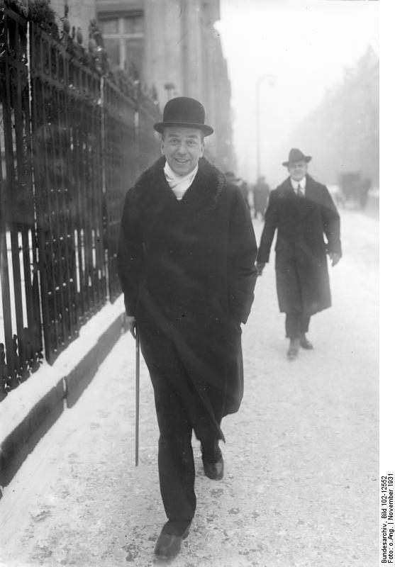 Zu den Verhandlungen über die deutschen Reparationszahlungen zwischen dem deutschen Botschafter von Hoesch und dem französischen Ministerpräsidenten Laval in Paris. Der deutsche Botschafter in Paris von Hoesch, welcher mit dem kürzlich aus Amerika zurückgekehrten französischen Ministerpräsidenten Laval Verhandlungen über die deutschen Reparationsleistungen führt.